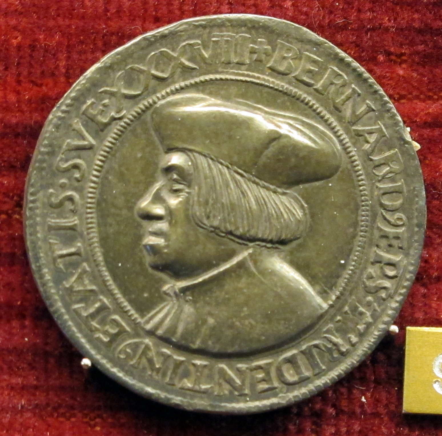 medaglia tedesca